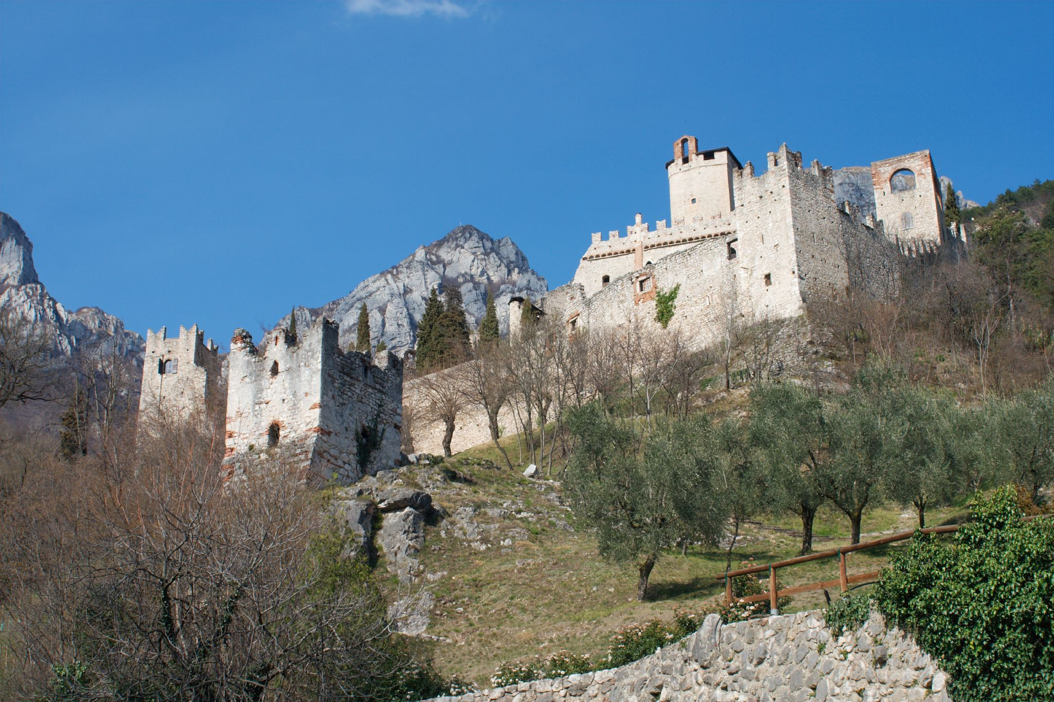 Il castello di avio. Avio, Trentino-Alto Adige. – Una vista del castello di avio dalla parte bassa.